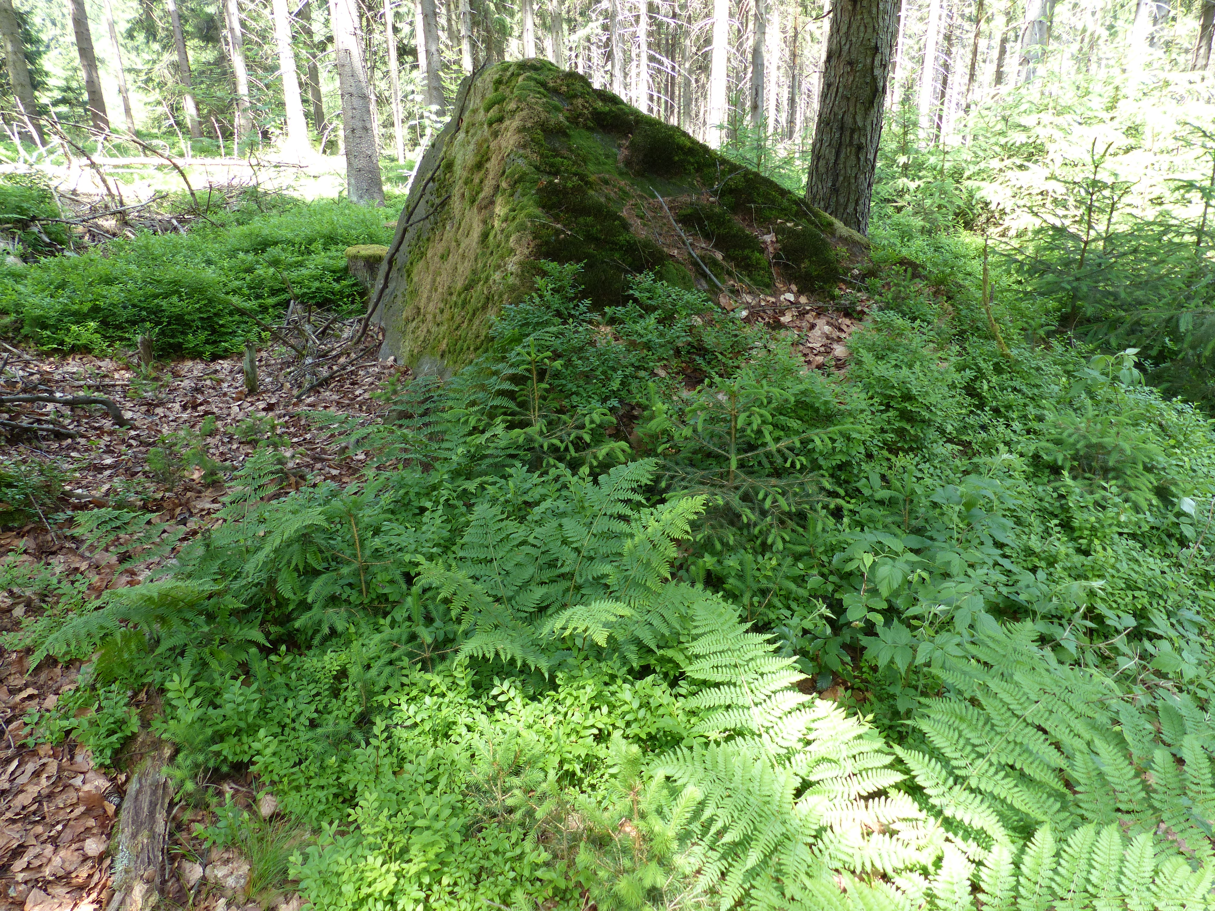 Zellerfels, Geotop am Großen Waldstein im Fichtelgebirge